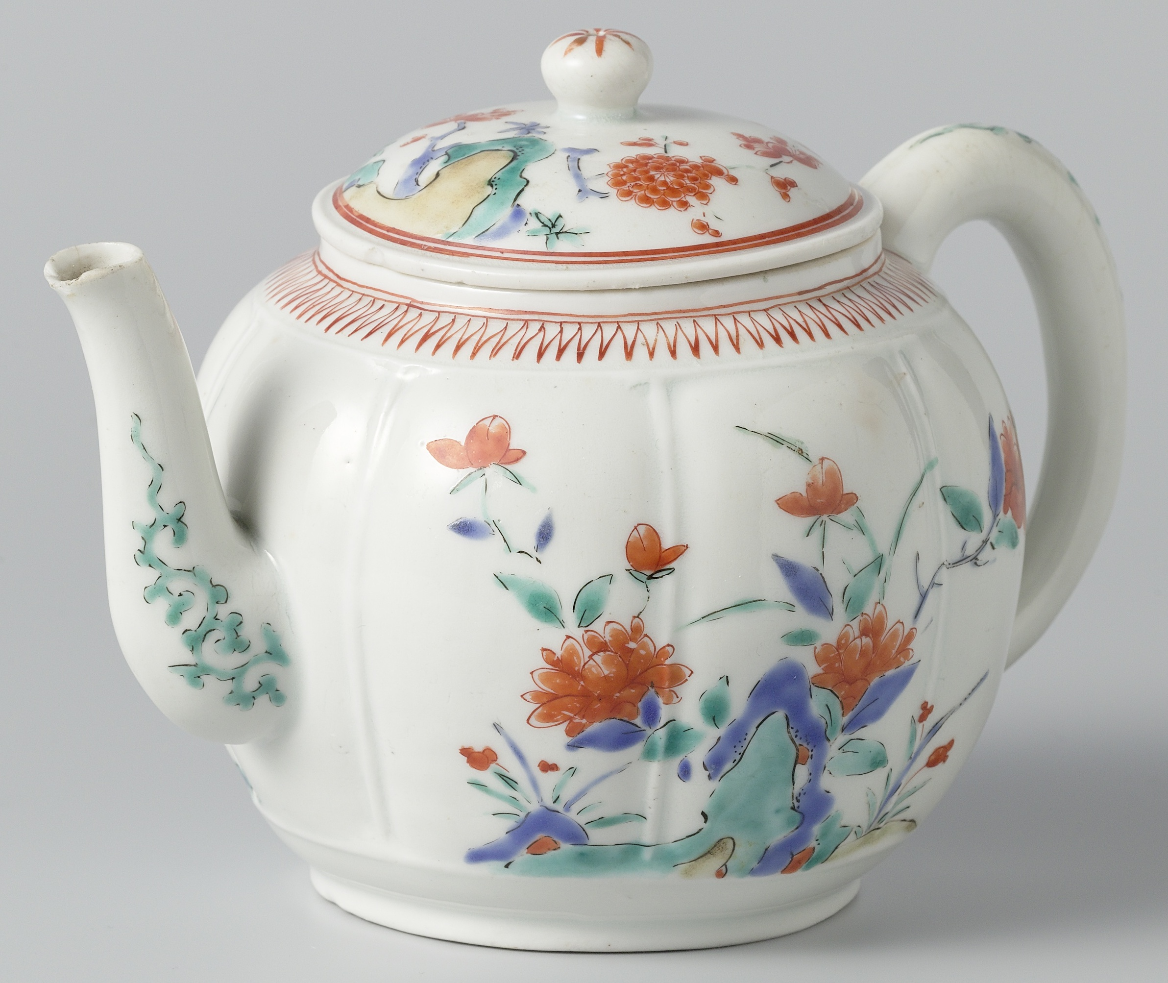 Theepot van porselein waarvan het achtlobbige lichaam is verdeeld in verticale ribben. Beschilderd in blauw, rood, groen, geel en zwart. Op de wand prunus aan de ene kant en een pioenroos aan de andere, beide bij rotsen. Groene bladranken op tuit en oor. Een zigzag ornamentband in rood langs de mondrand. Het deksel is beschilderd met prunus op rotsen binnen een dubbele rode cirkel. Kakiemon decor. Label Line: anoniem, ca. 1670 - ca. 1690, vergulden